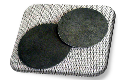 Molybden - Mo